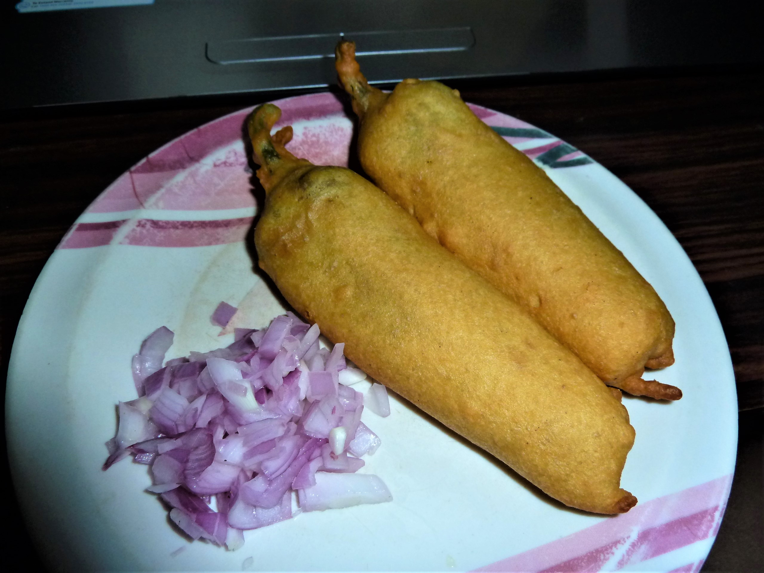 పచ్చిమిర్చి బజ్జీ